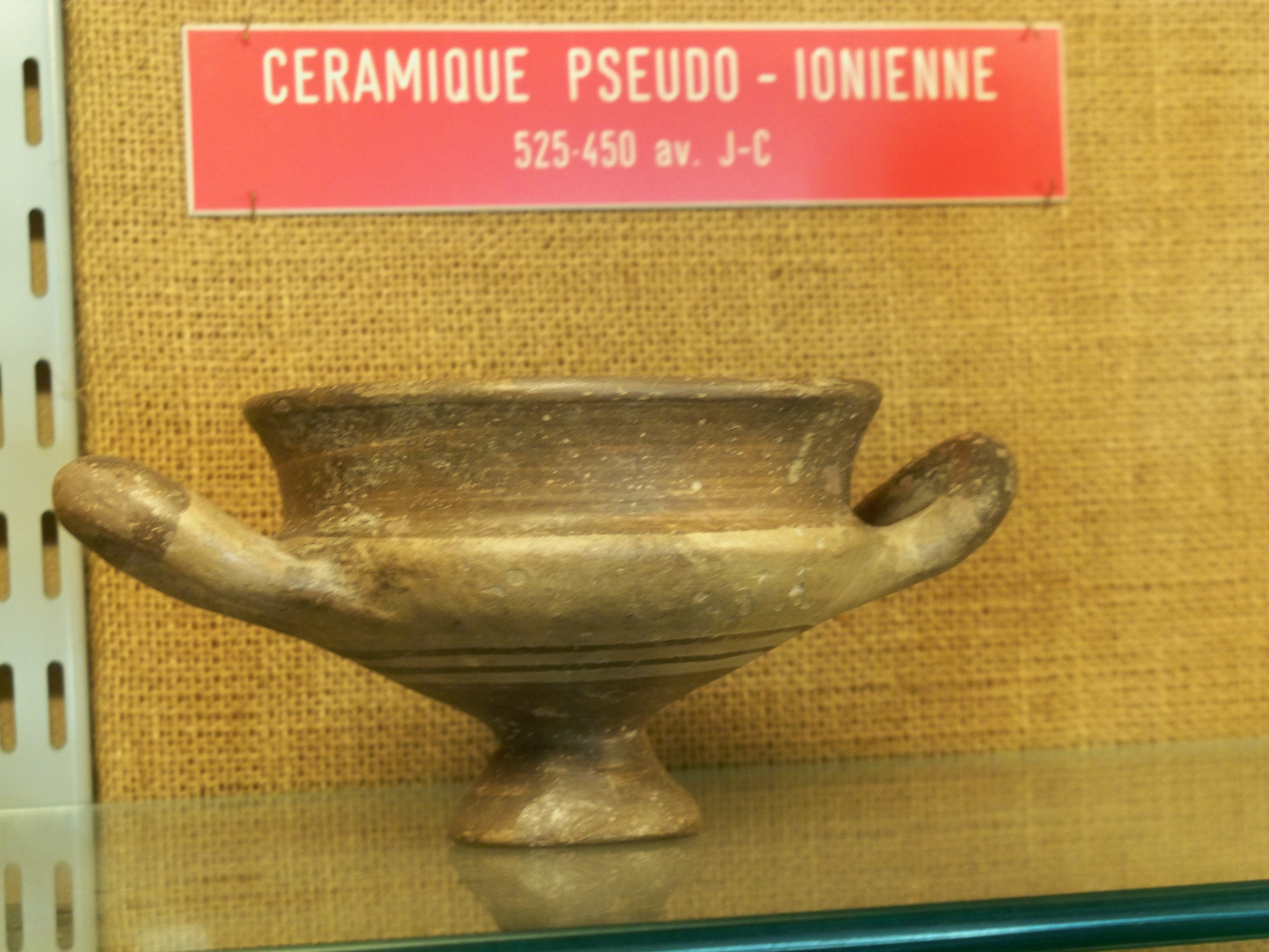 Vase à vin, au musée du Pègue, Drôme, France